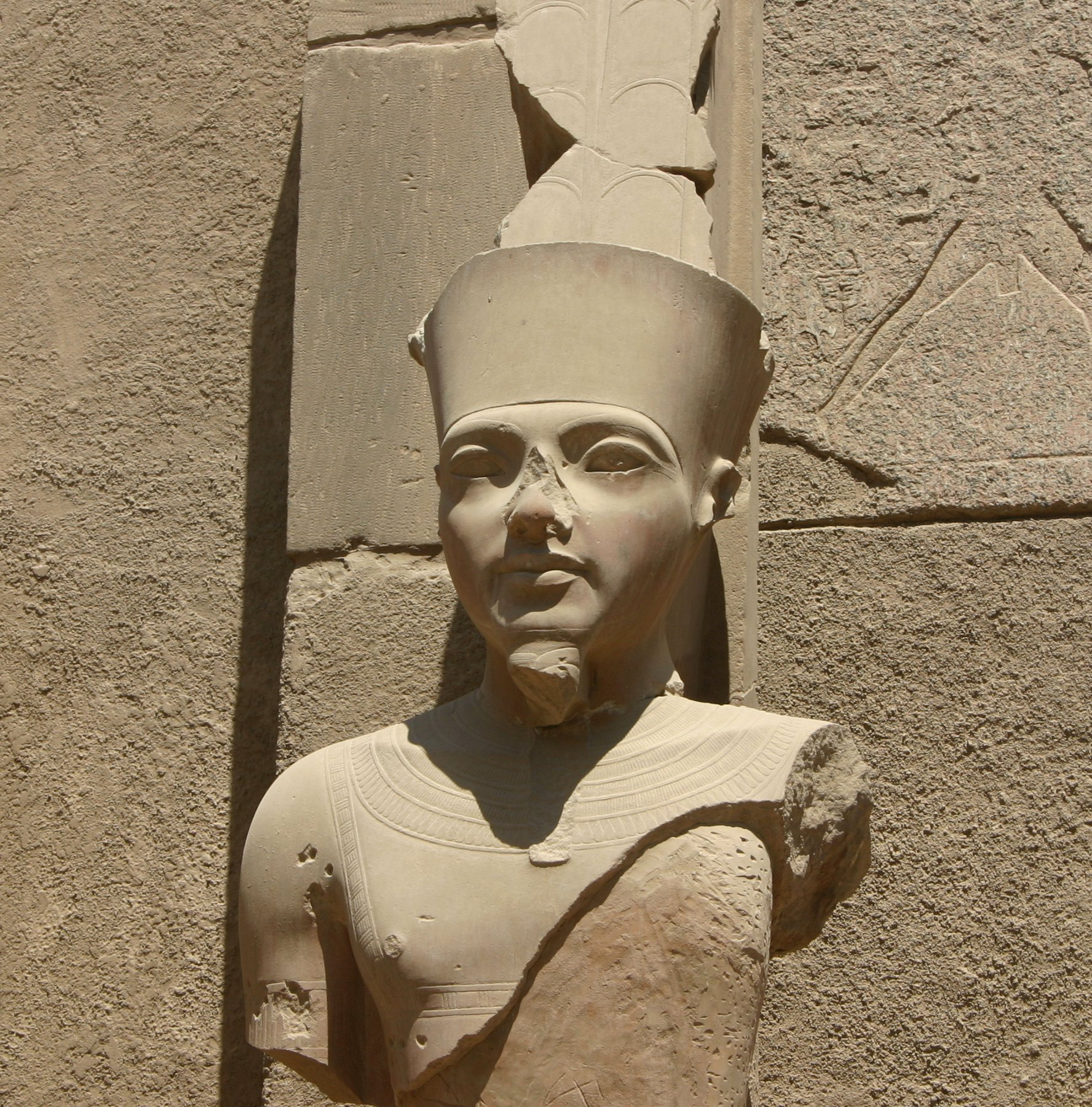 Statue of Tutankhamum at Karnak, Egypt